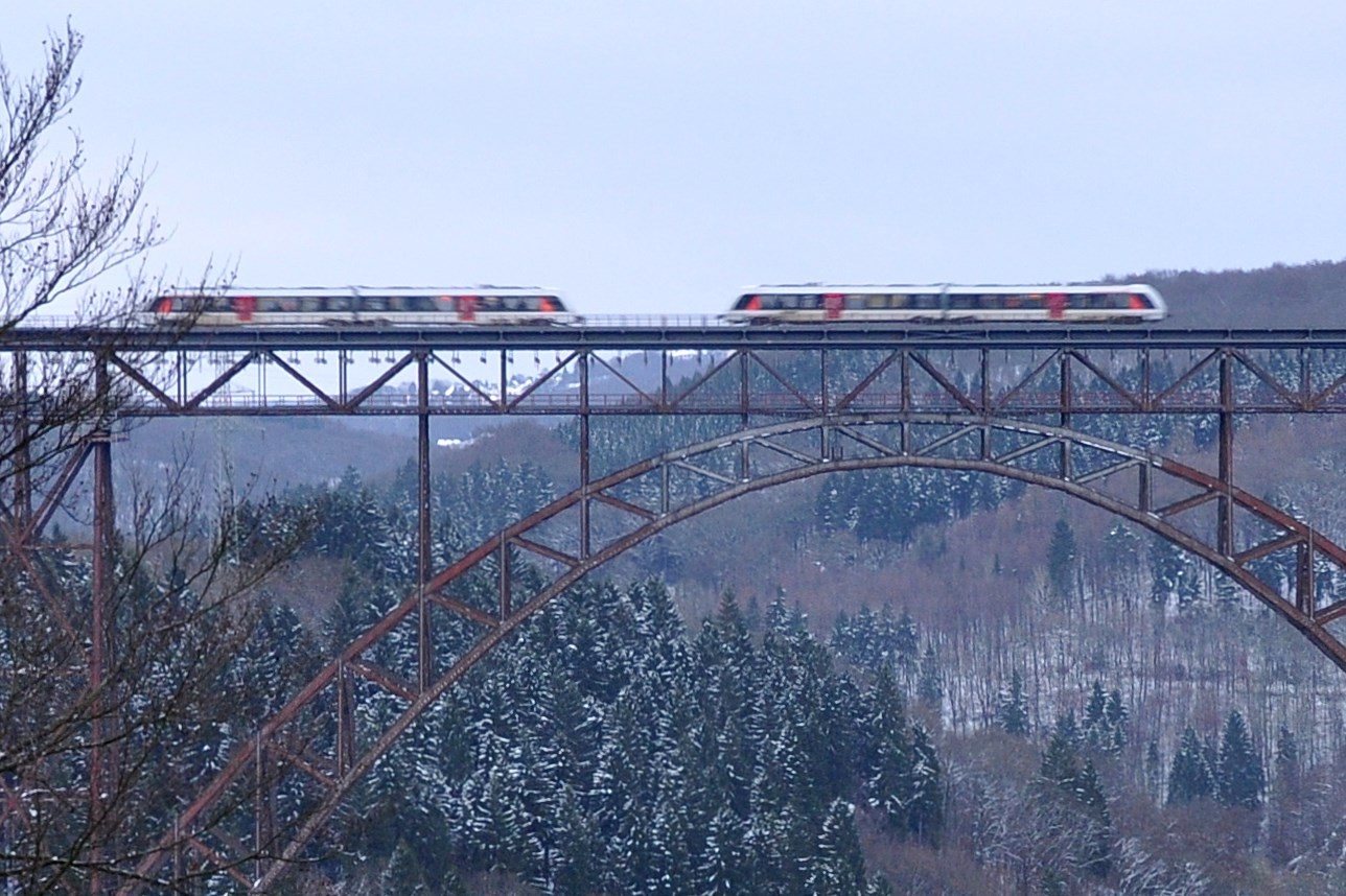 Treffen zweier LINT-Triebwagen von Abellio Rail NRW auf der Müngstener Brücke bei Solingen an einem späten Abend im Dezember 2014.